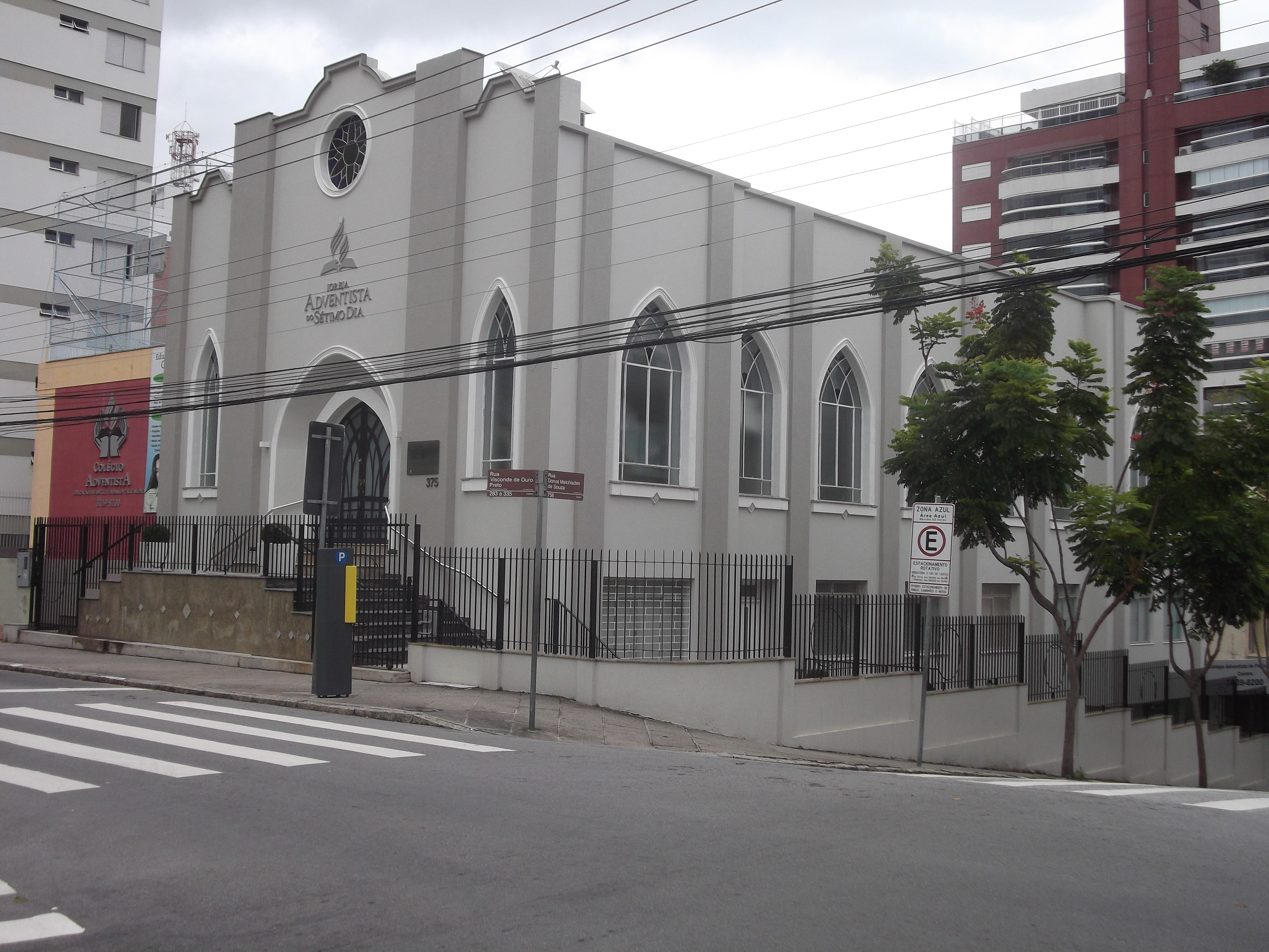 Igreja Adventista do Sétimo Dia, Florianópolis, Brasil